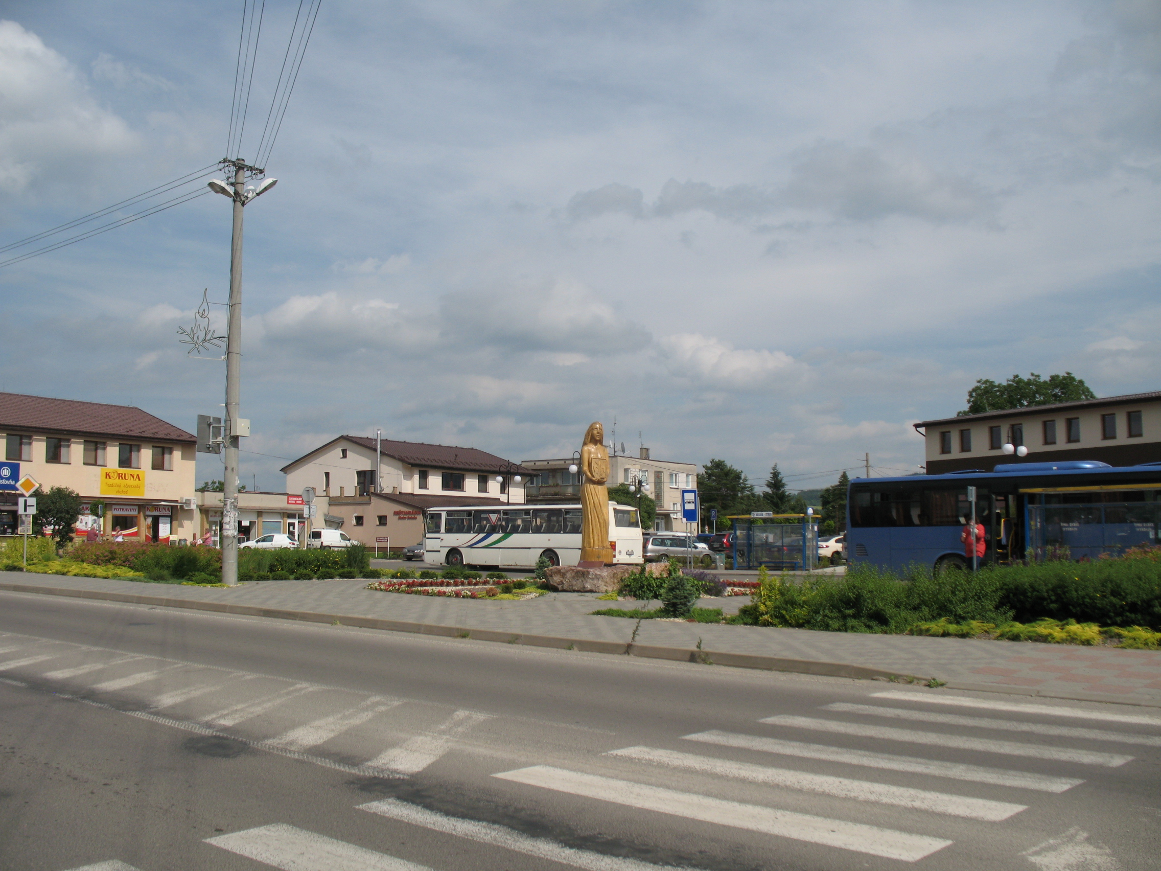 Bellus